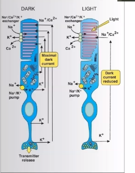 מעבר יונים בפוטורצפטור בסביבה מוארת וחשוכה